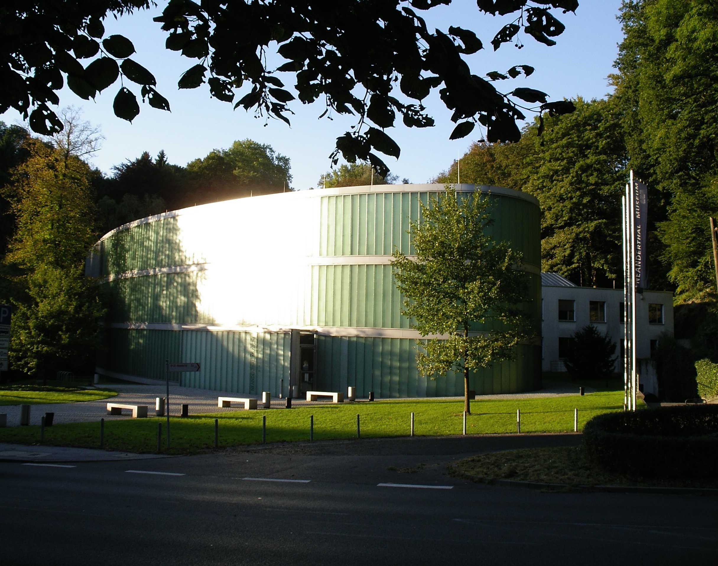 Das neue Neanderthal Museum, im Kreis Mettmann. Bild von "vorne". Architect: Günter Zamp Kelp